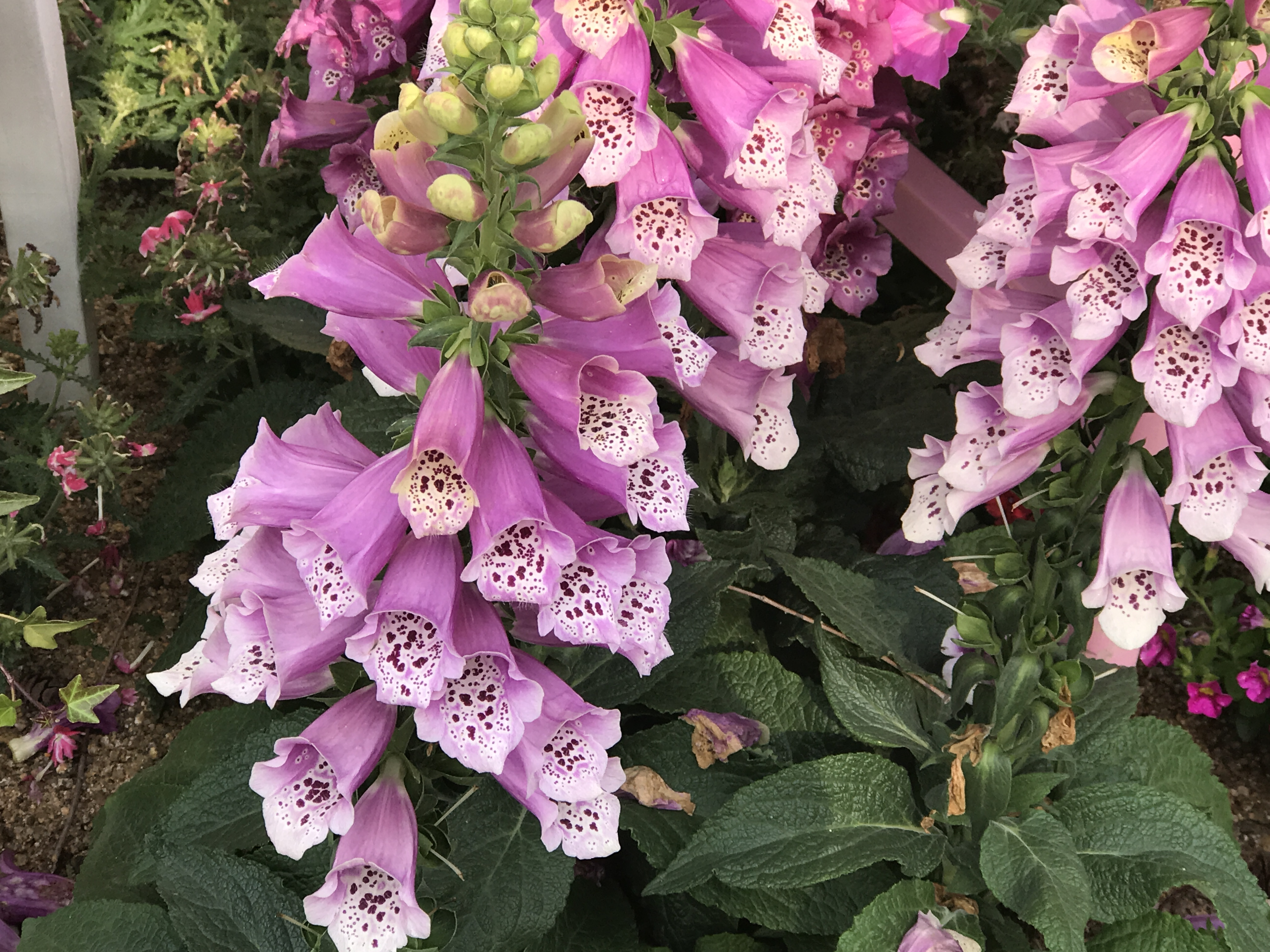 디기탈리스를 찍은 모습이다